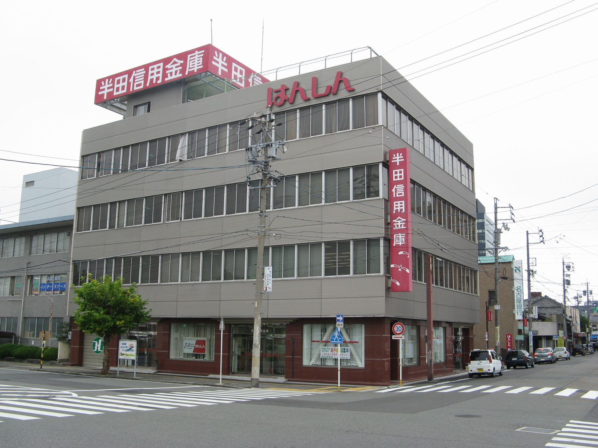 半田信用金庫本店（愛知県半田市）